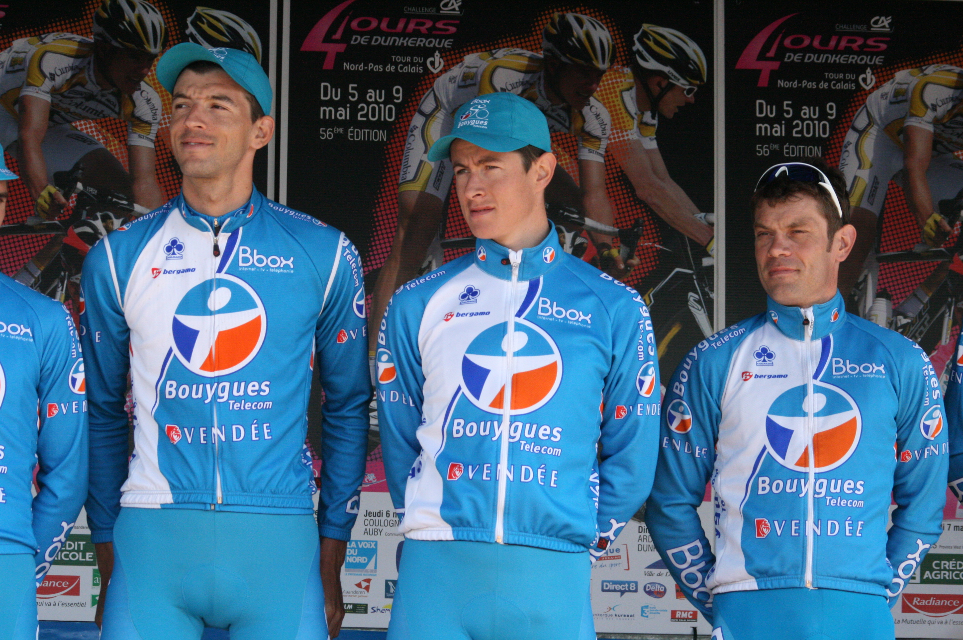 Said Haddou, Alexandre Pichot et Frank Bouyer lors de la présentation des équipes des 4 jours de Dunkerque 2010